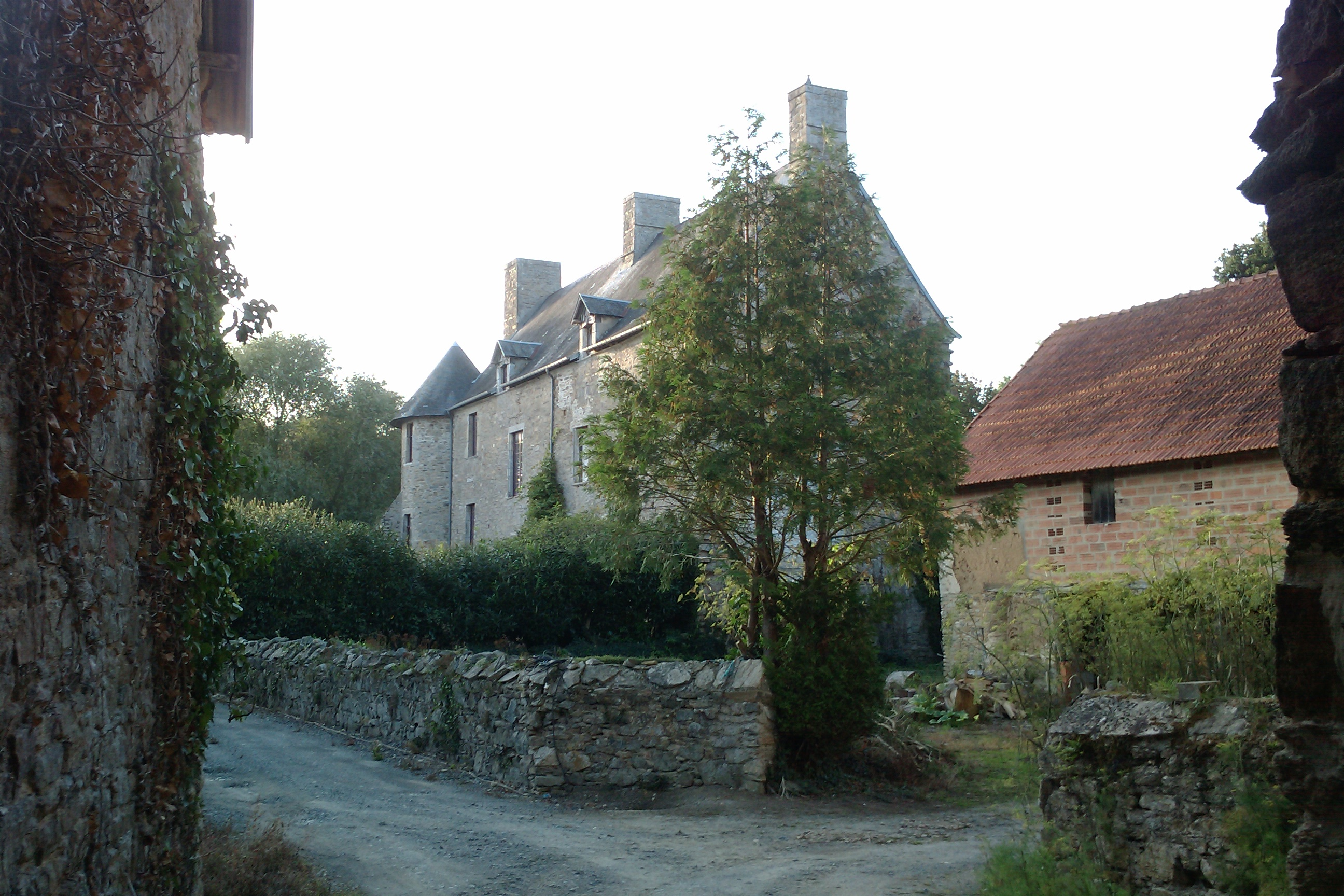 Manoir d'Hubertant, à Lozon (France) .